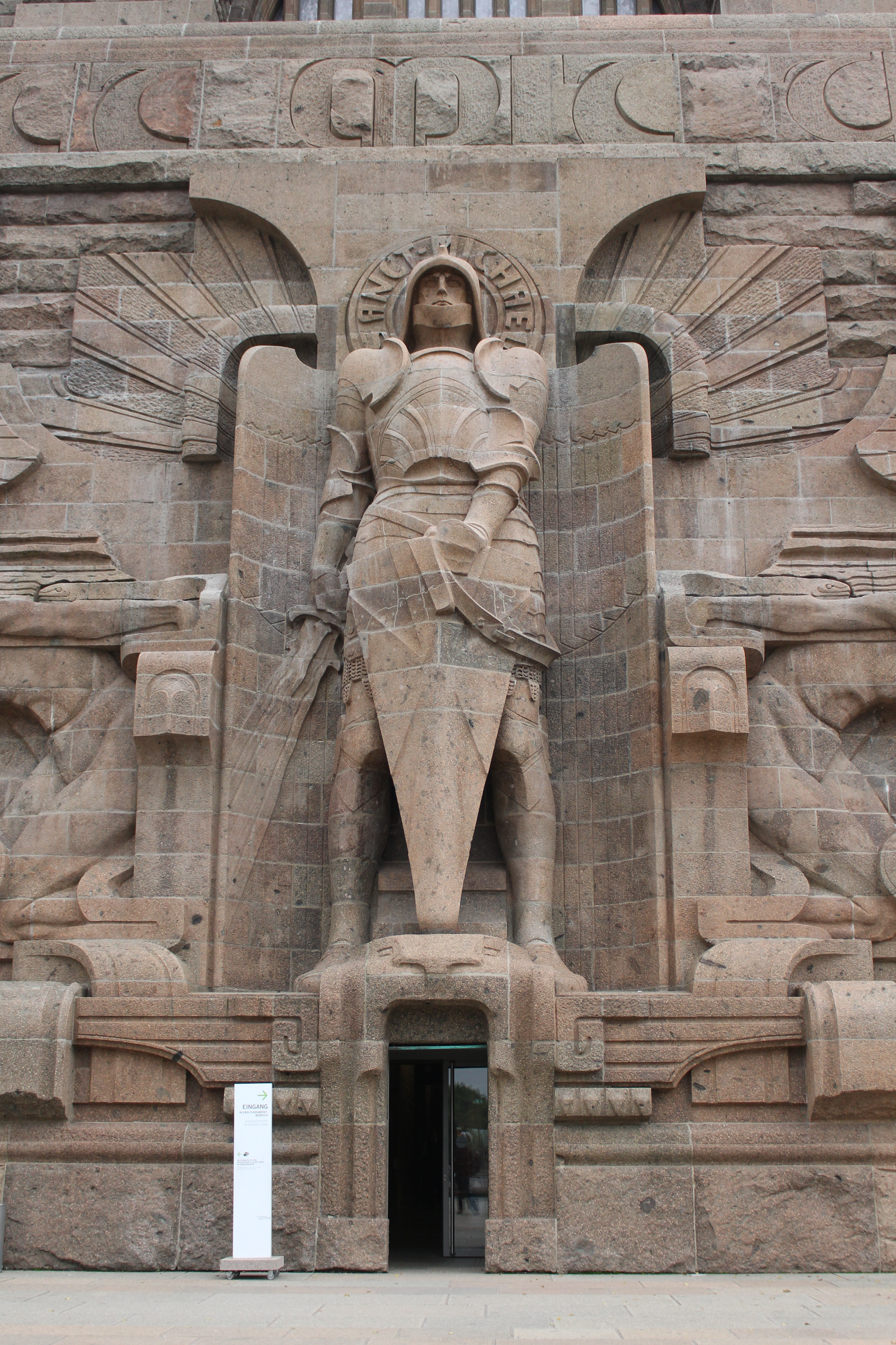 Der Eingang zum Völkerschlachtdenkmal, bewacht durch den Erzengel Michael.